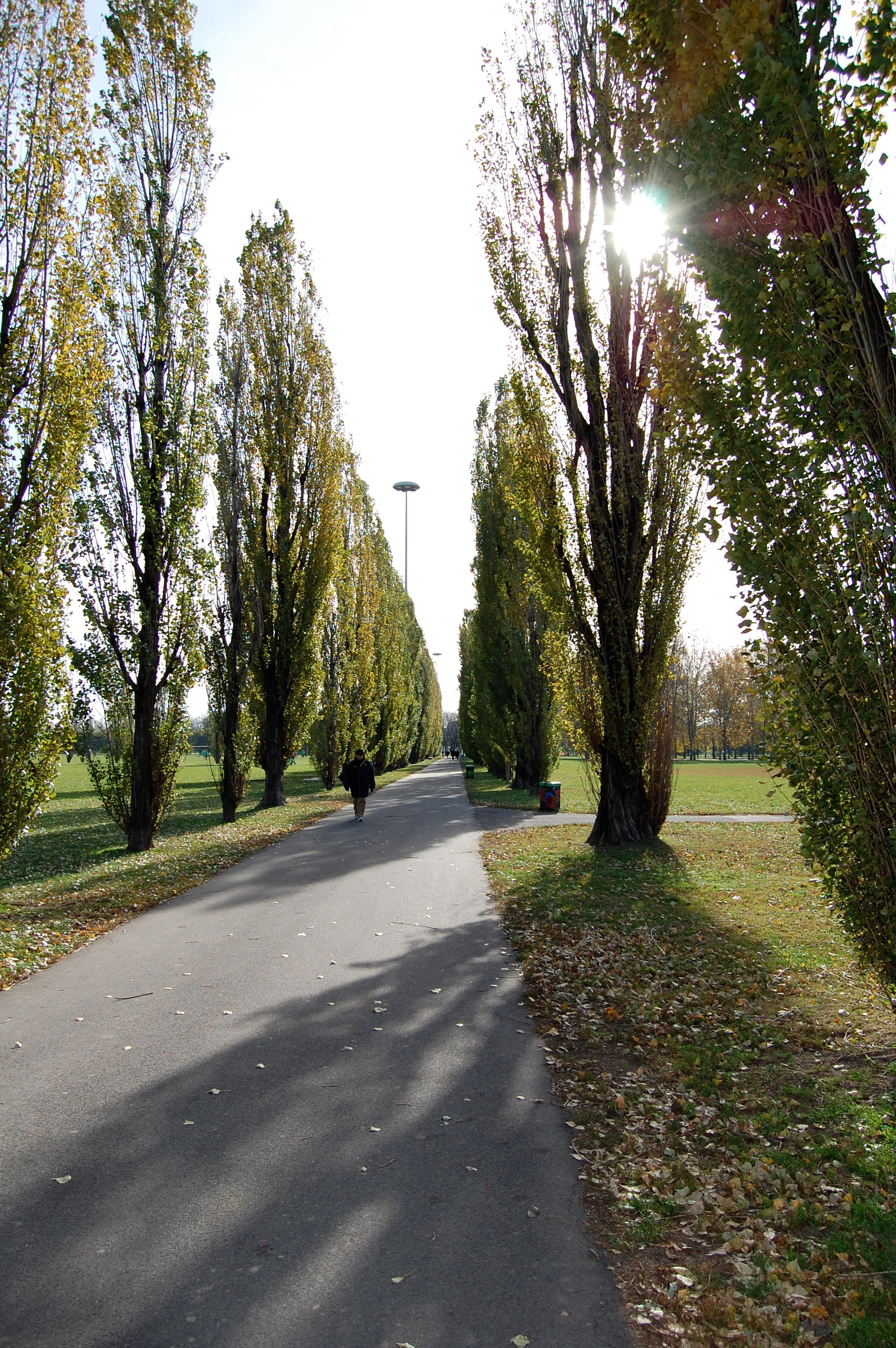 Tipico viale rettilineo del Parco di Trenno a Milano.